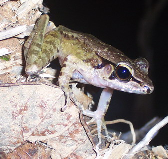 Huia masonii from Jabranti, Kuningan, West Java, Indonesia